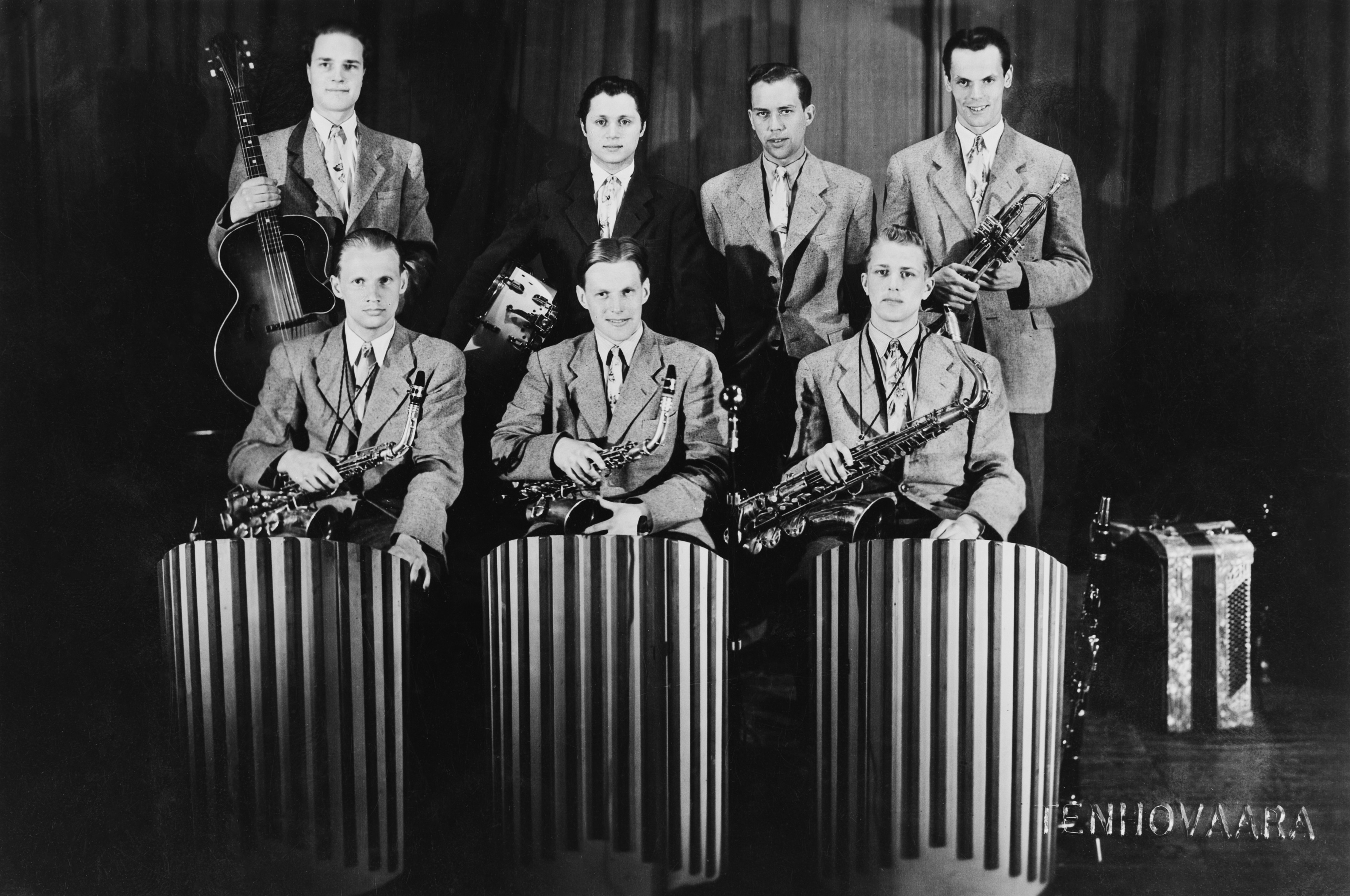 Jaakko Vuormaan miniband: Olli Borg, Pärre Förars, Mauno Mustonen (sax), LeRoy Wickström (g), Jaakko Vuormaa (dm), Börje Haglund (p), Yrjö Luukkonen (tp).